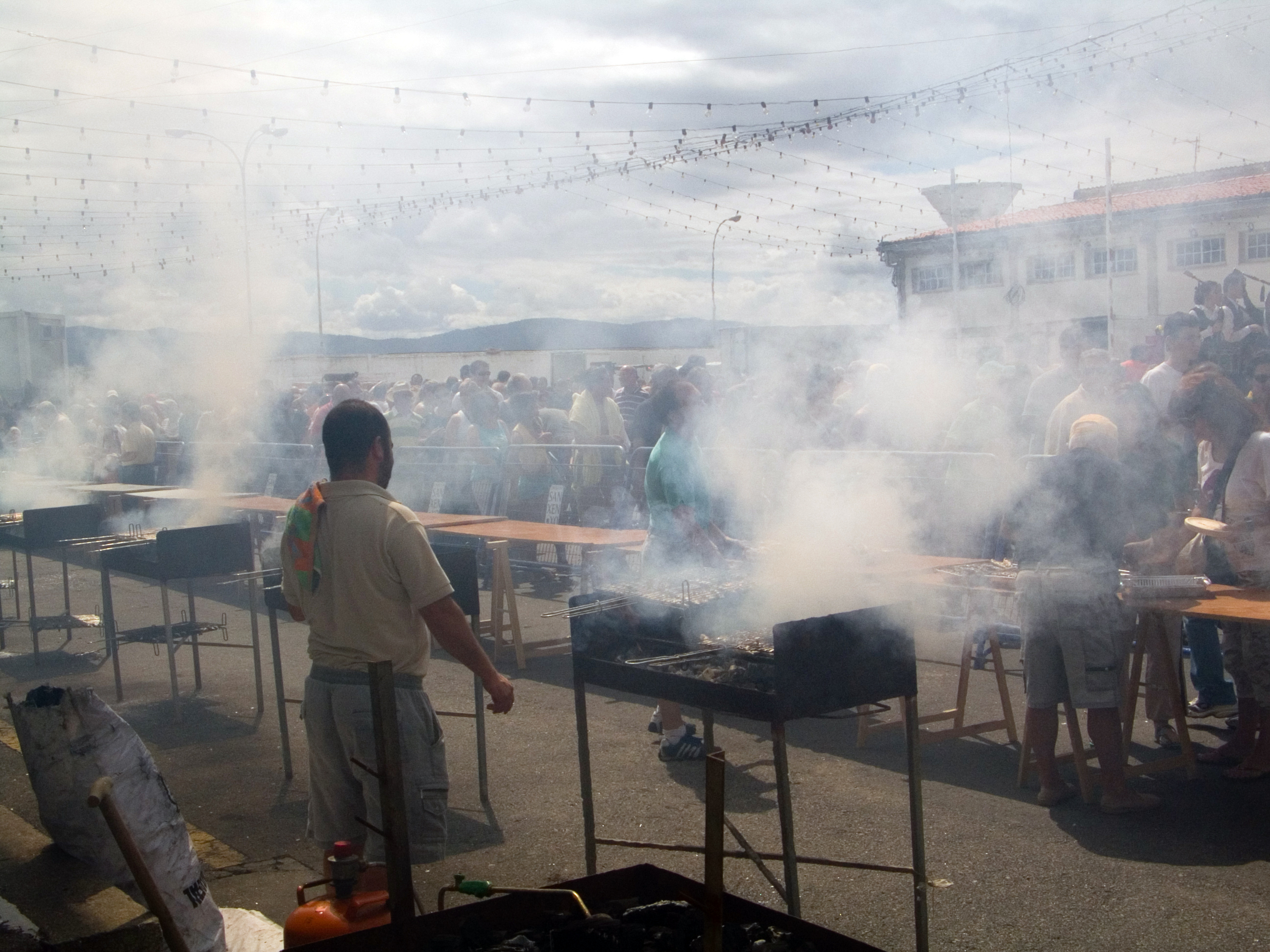 Sardinaren jaia Portonovon (Pontevedra).